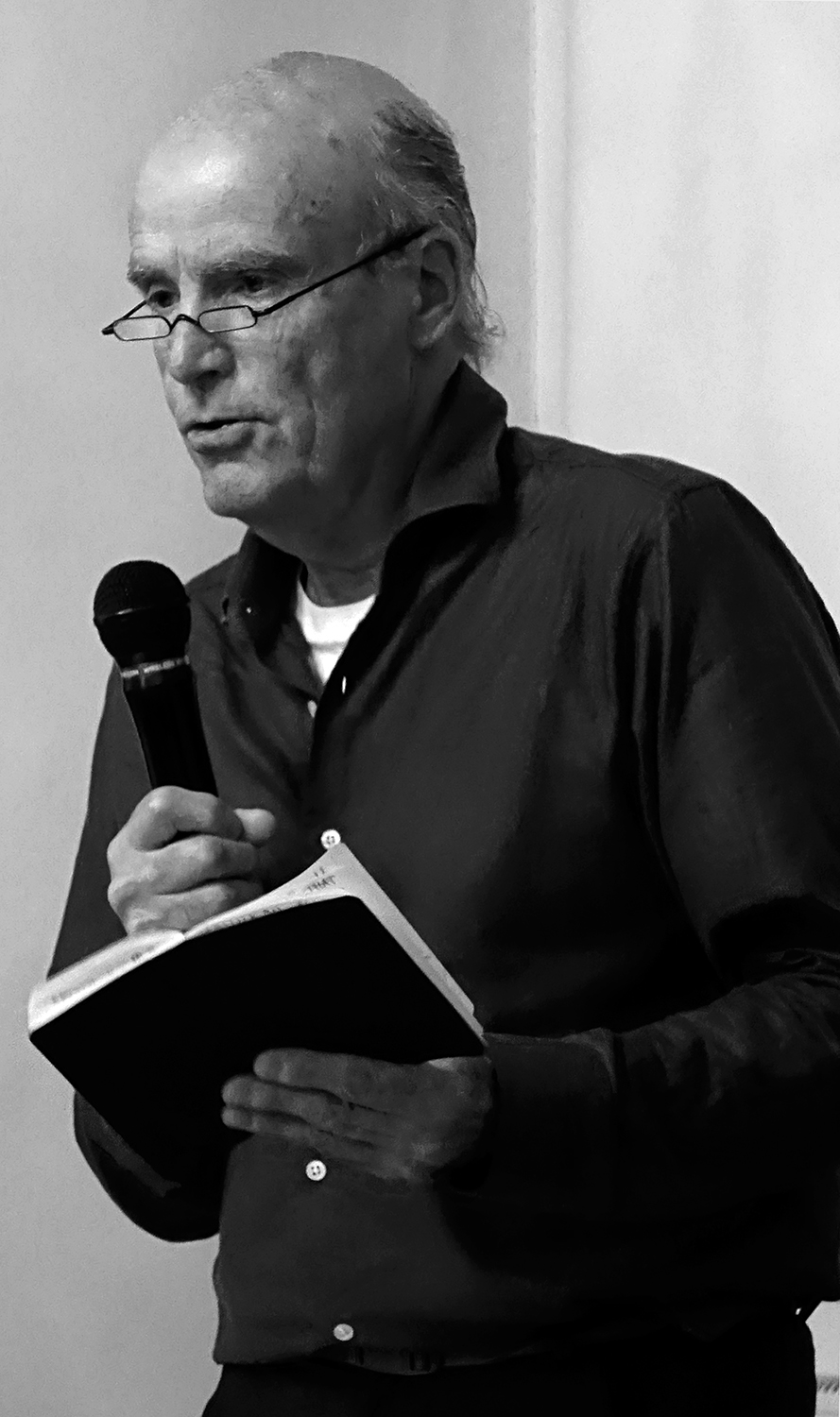 Hamish Fulton